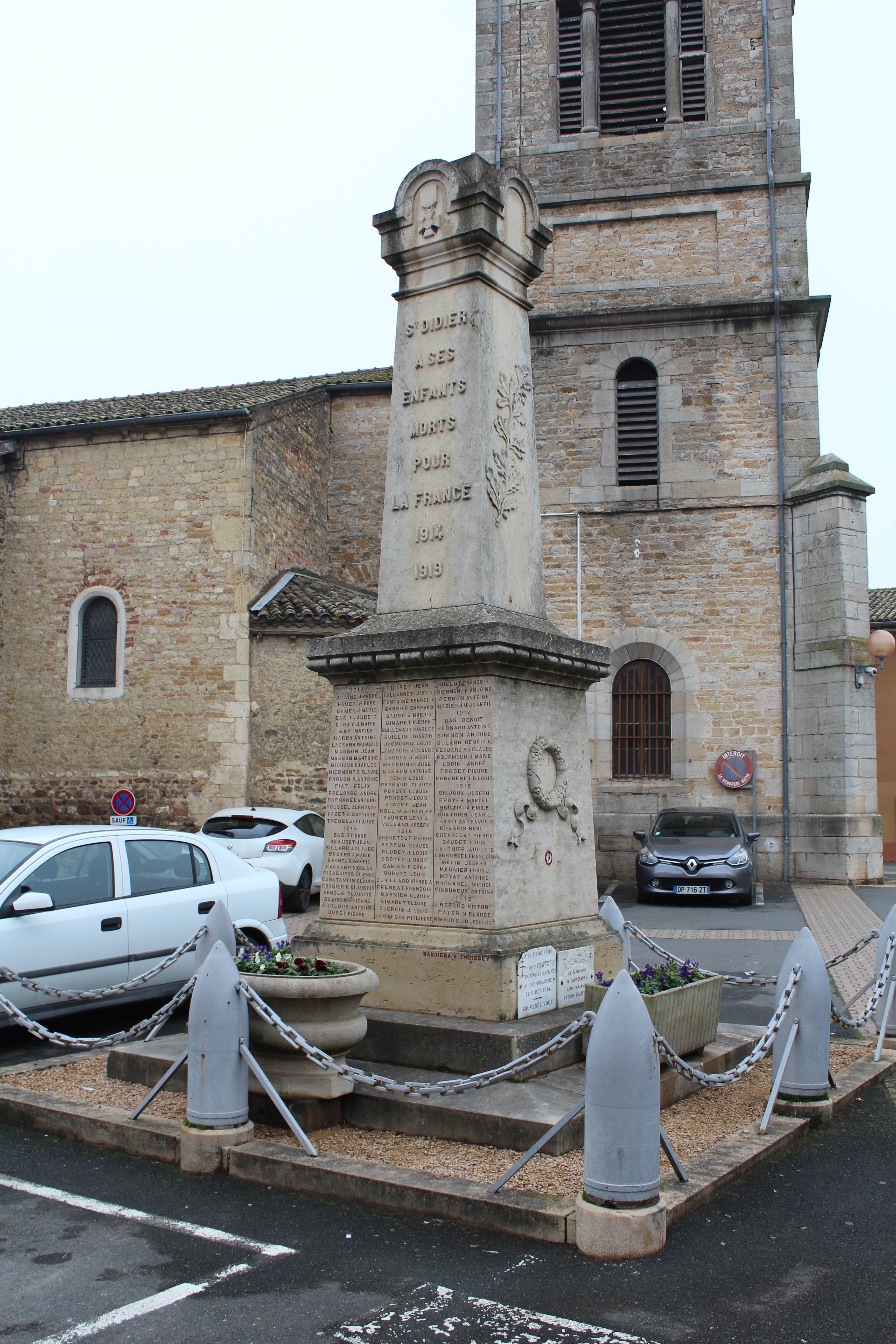 Monument aux morts de Saint-Didier-sur-Chalaronne.